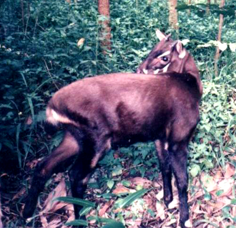 Thể loại:Sách đỏ Việt Nam